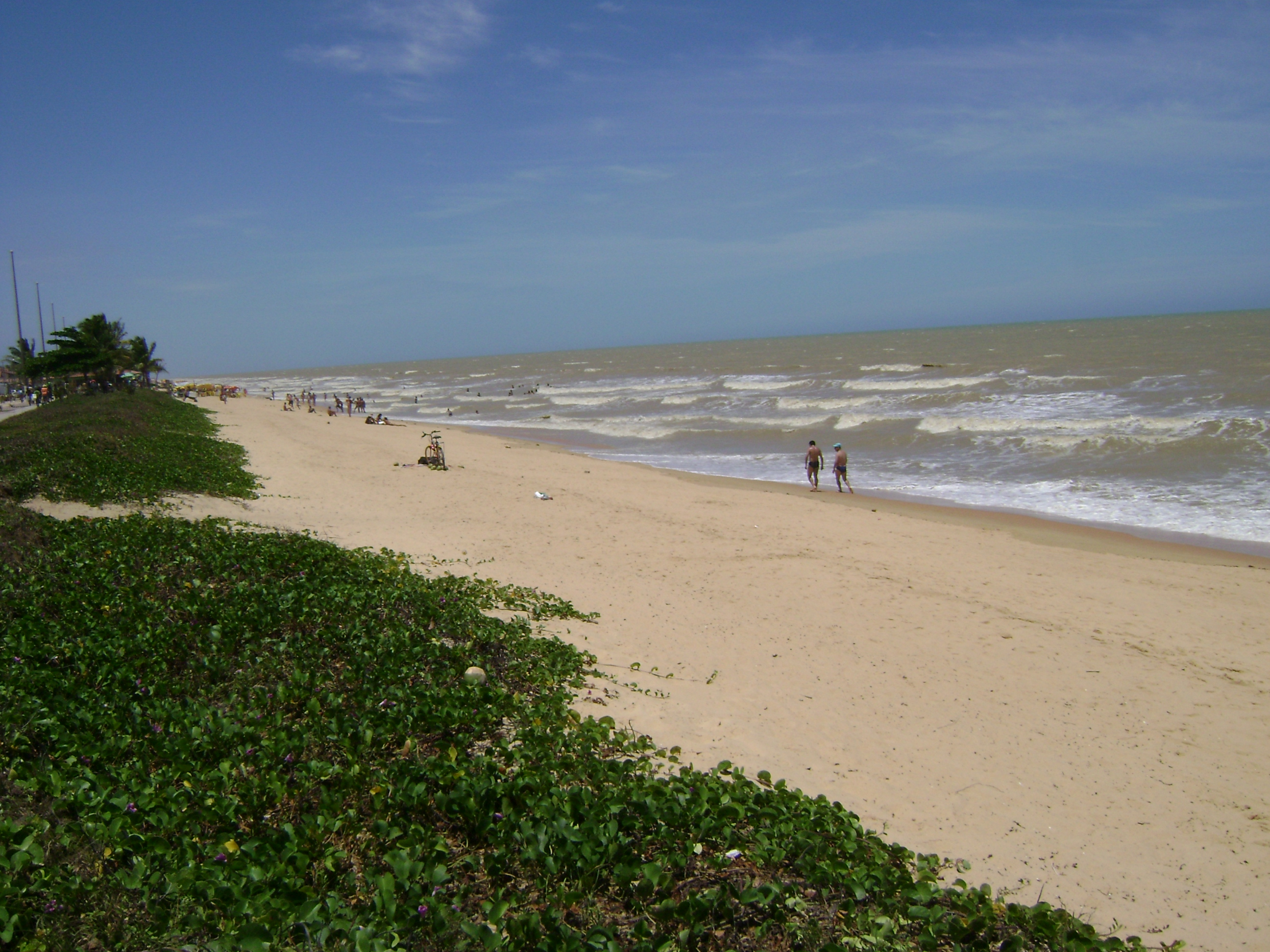 Praia entre a Praia de Iansã e a praia de Alcobaça (ou praia central), em Alcobaça, Bahia, Brasil.